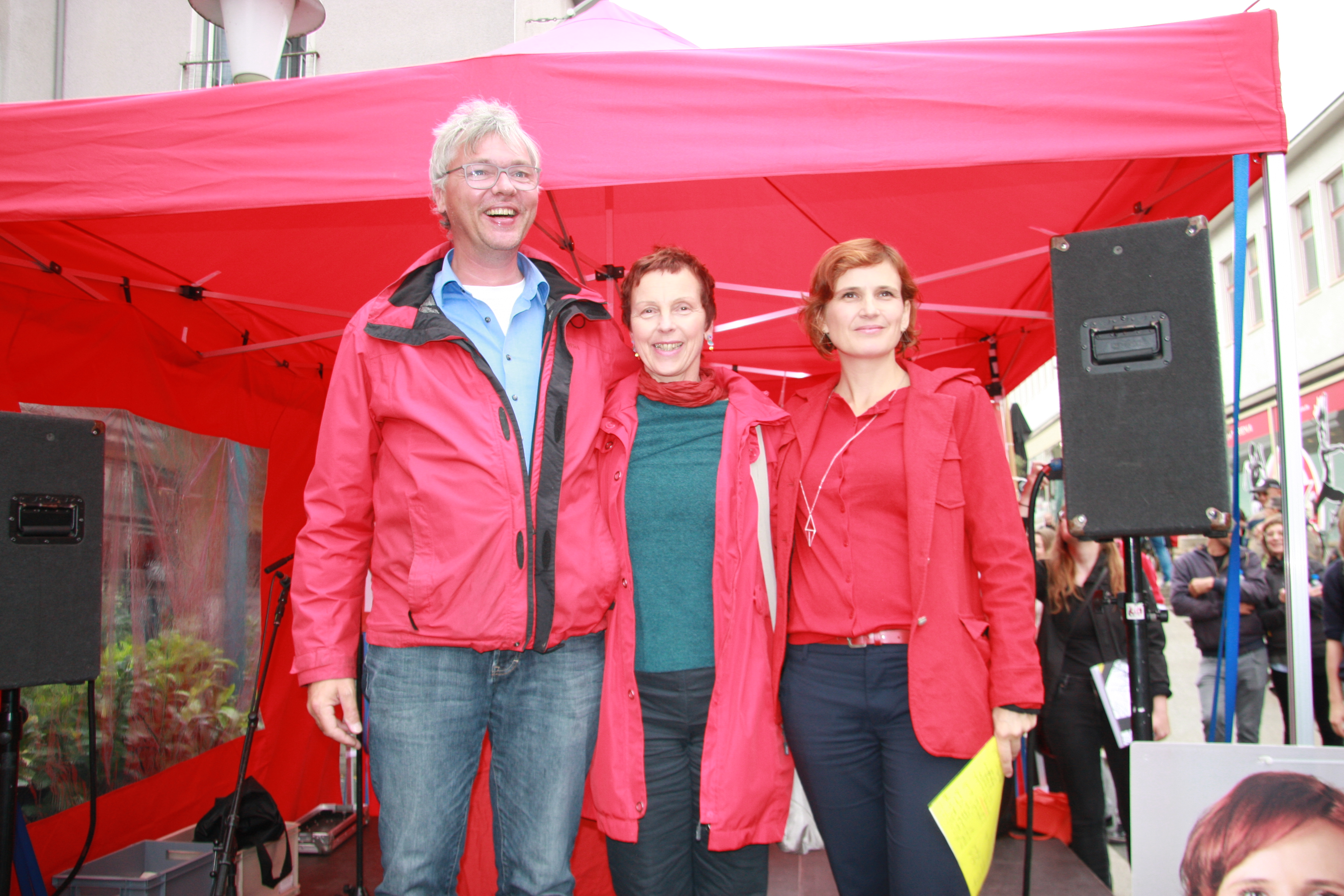 Katja Kipping, Sabine Leidig und Torstenfelstehausen in Kassel